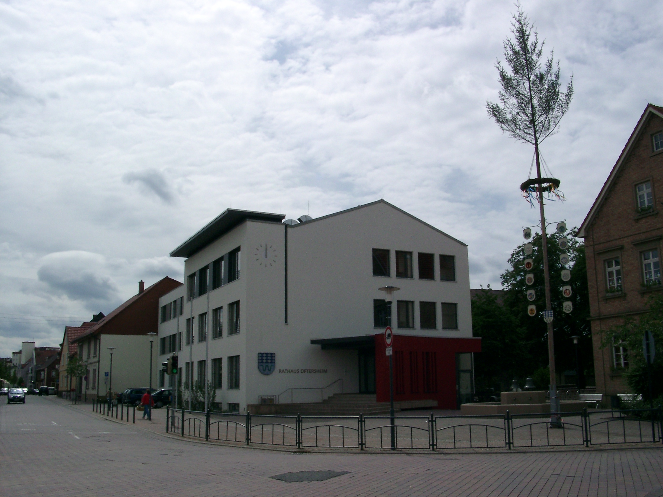 Oftersheim, Rathaus